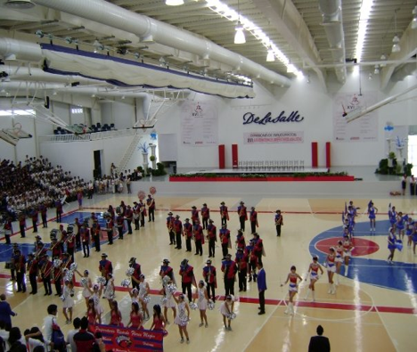 Inauguración de los XVI Juegos Universitarios Lasallistas, en Ciudad Victoria